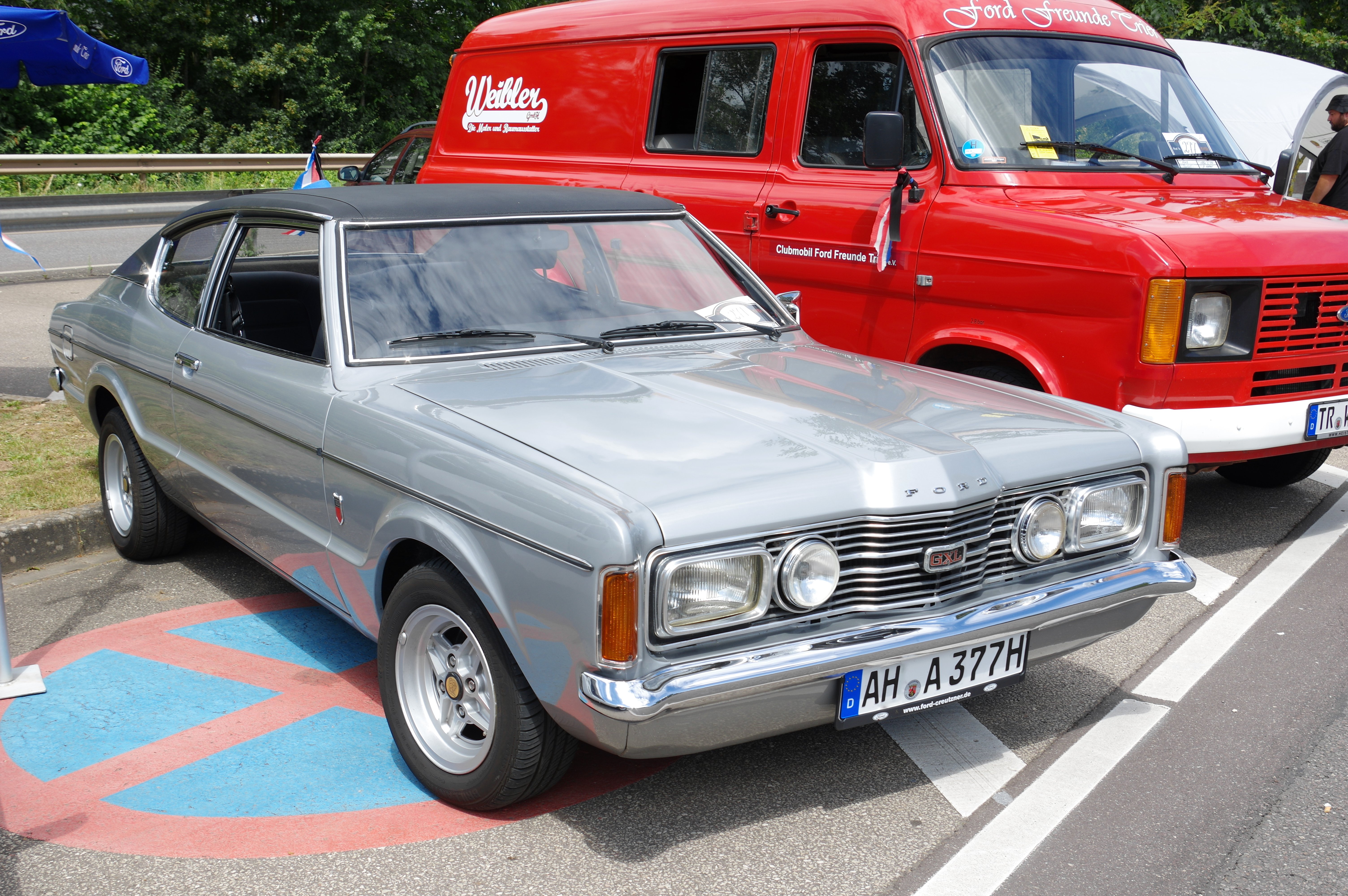 Ford Taunus TC GXL, 1973, 130 PS , 32. Internationales Oldtimer Treffen Konz 2016, Das Nummernschild ist verfälscht!